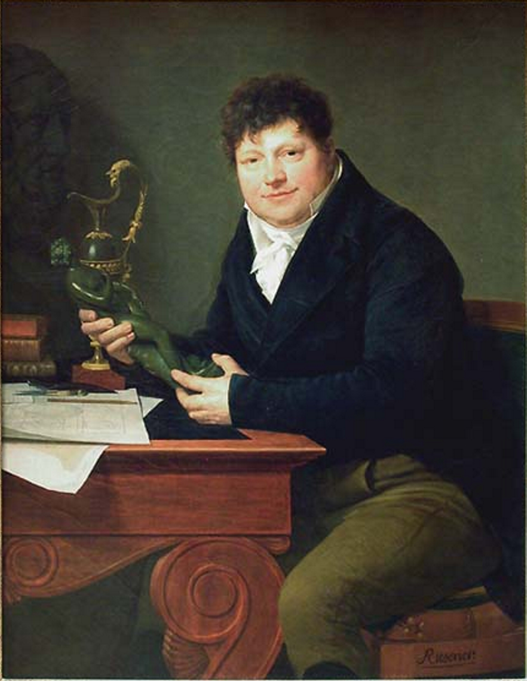 А.–Ф. Ризенер. Портрет кузена А.–А. Раврио